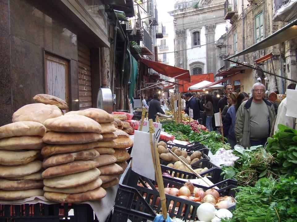 Scorcio del Mercato Ballarò